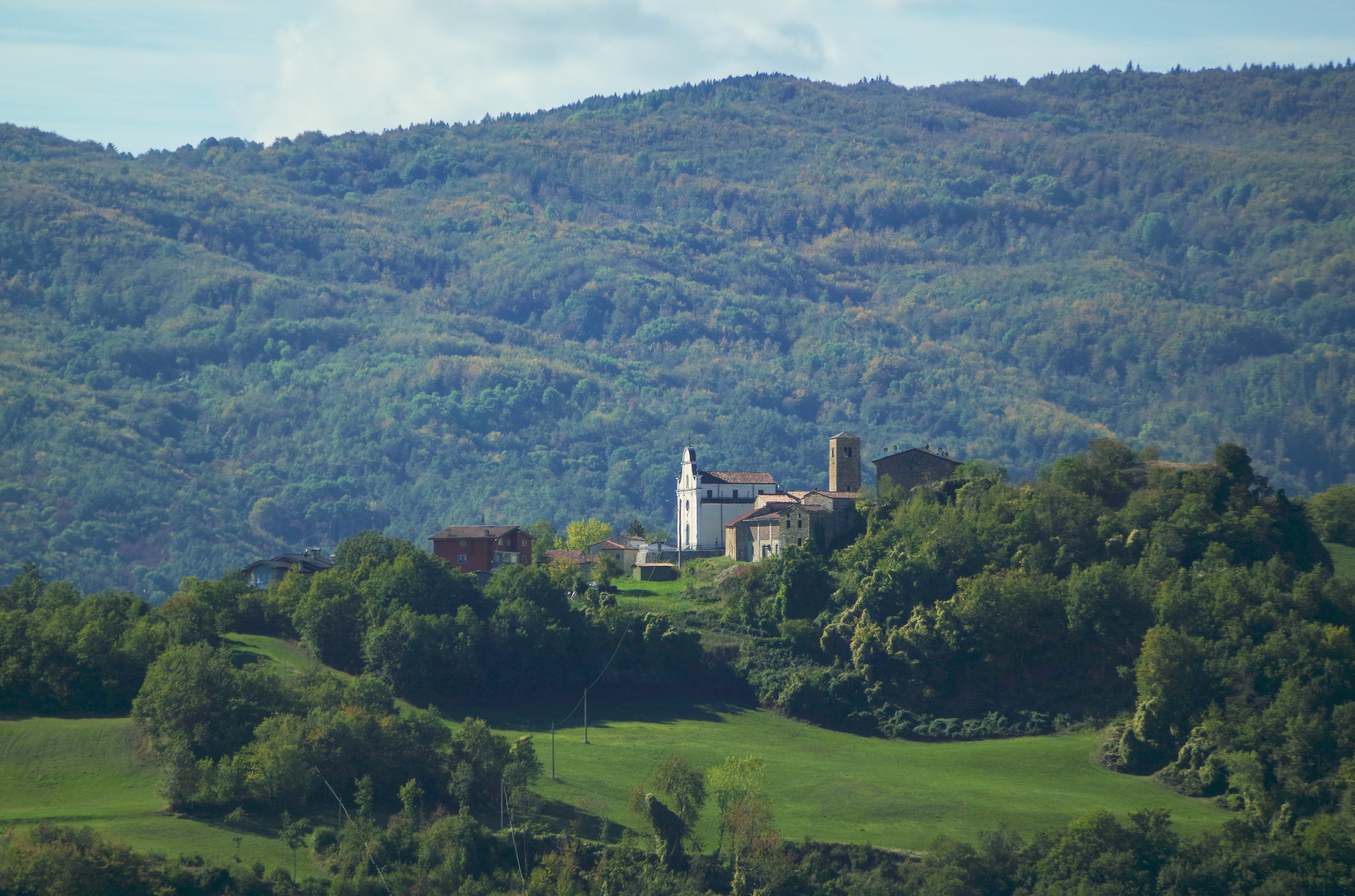 Veduta del borgo di Cogno S. Savino